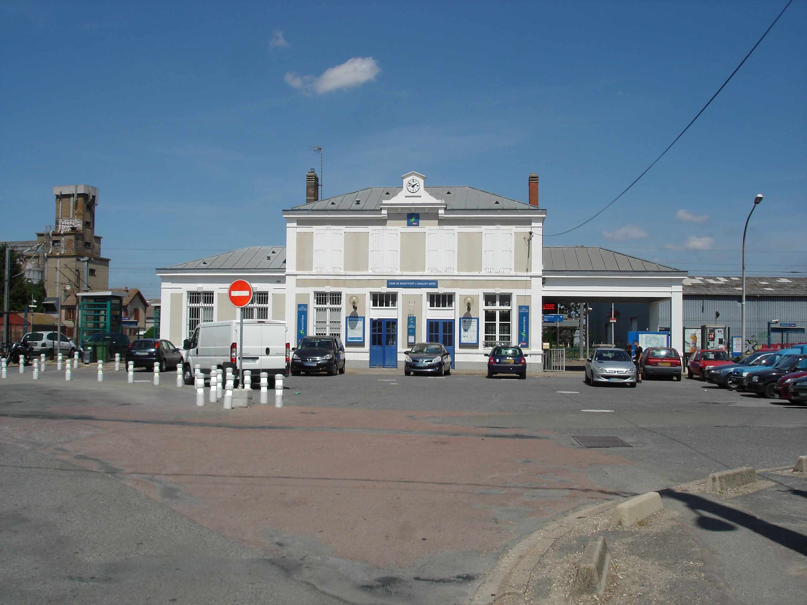 Gare de Montfort-l'Amaury - Méré (78) : Le bâtiment voyageurs.